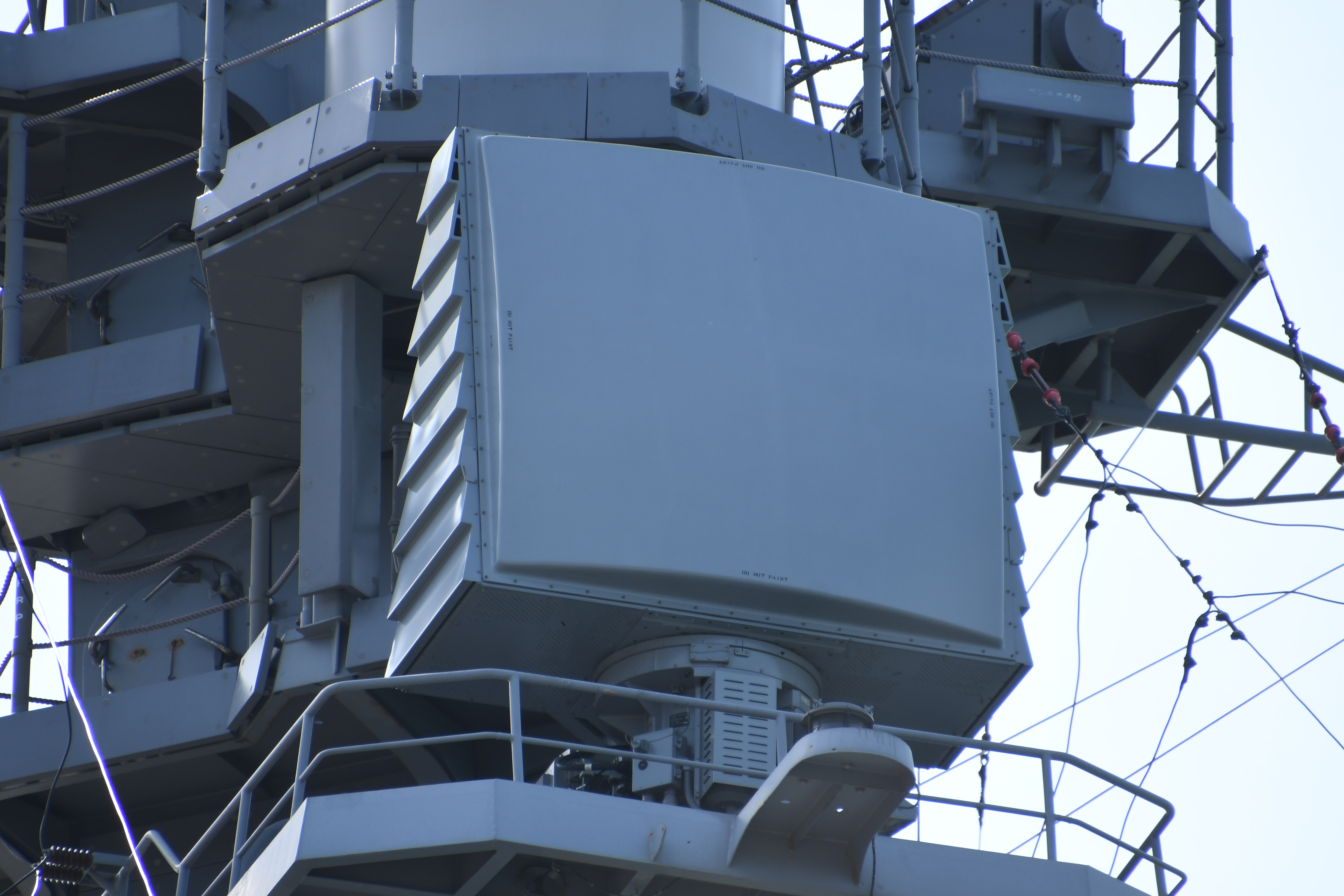 海上自衛隊 護衛艦あたご（DDG-177） マスト上のAN/SPQ-9B対水上レーダー 右舷前面。2019年4月13日 舞鶴基地にて。